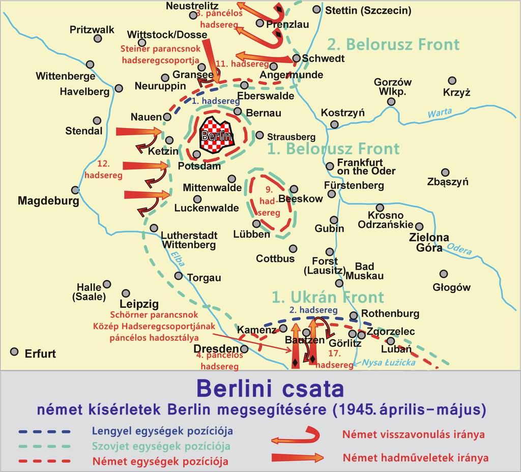 A berlini csata április-május közötti csapatmozgásainak magyar térképe - javított változat